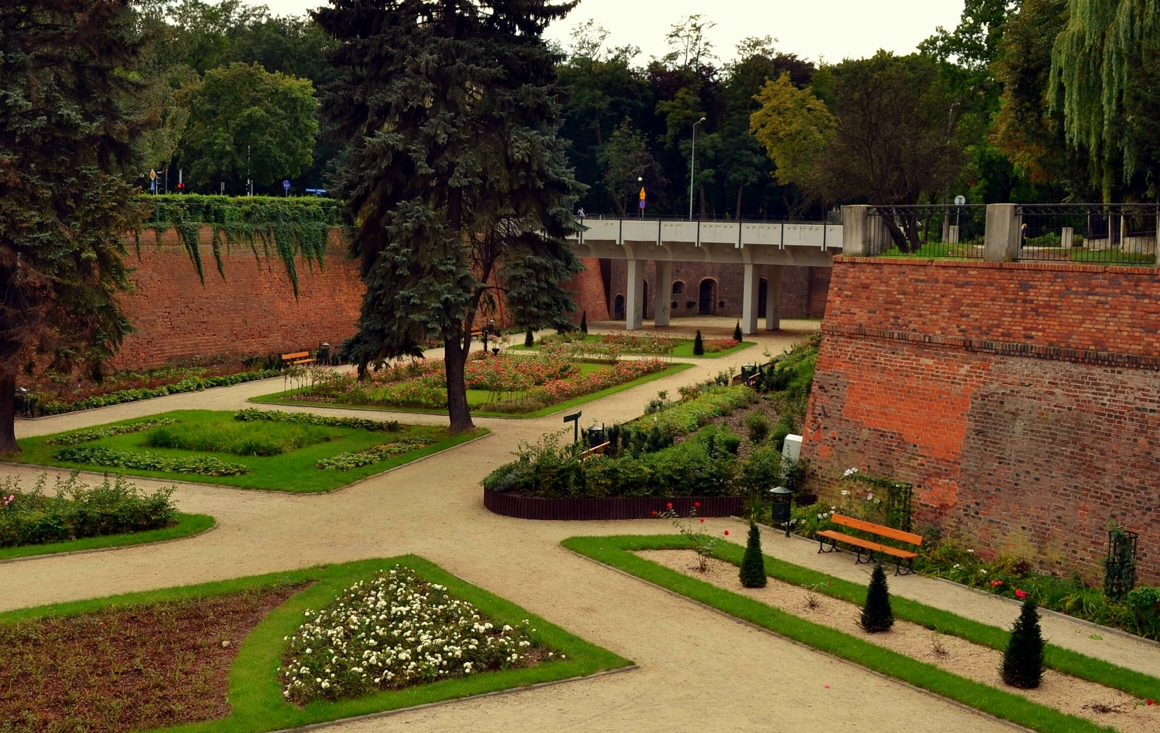 Głogów - obwarowania miejskie: fosa (zabytek nr A/2643/668)